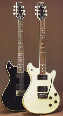 Zwei Westone Gitarren aus der seltenen und hochwertigen Prestige-Serie.